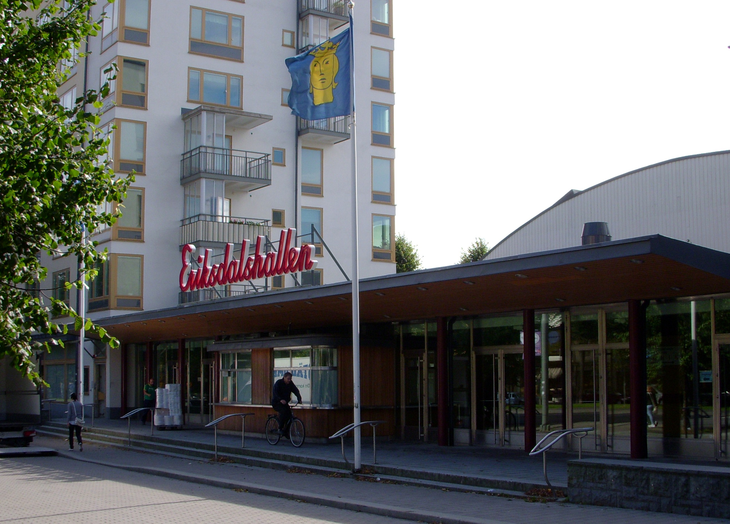 Eriksdalshallen på Södermalm i Stockholm